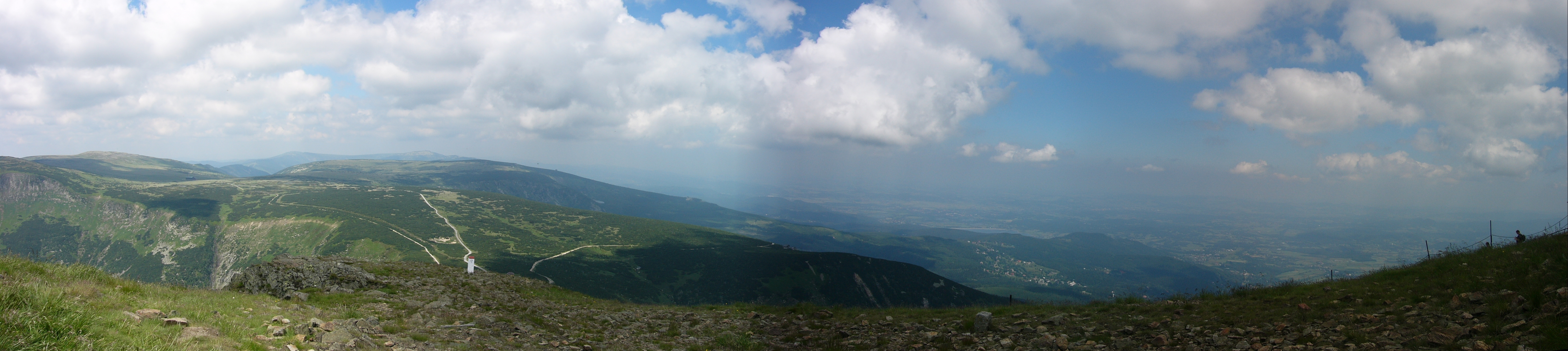 Panorama vu depuis Sniezka (POLOGNE)